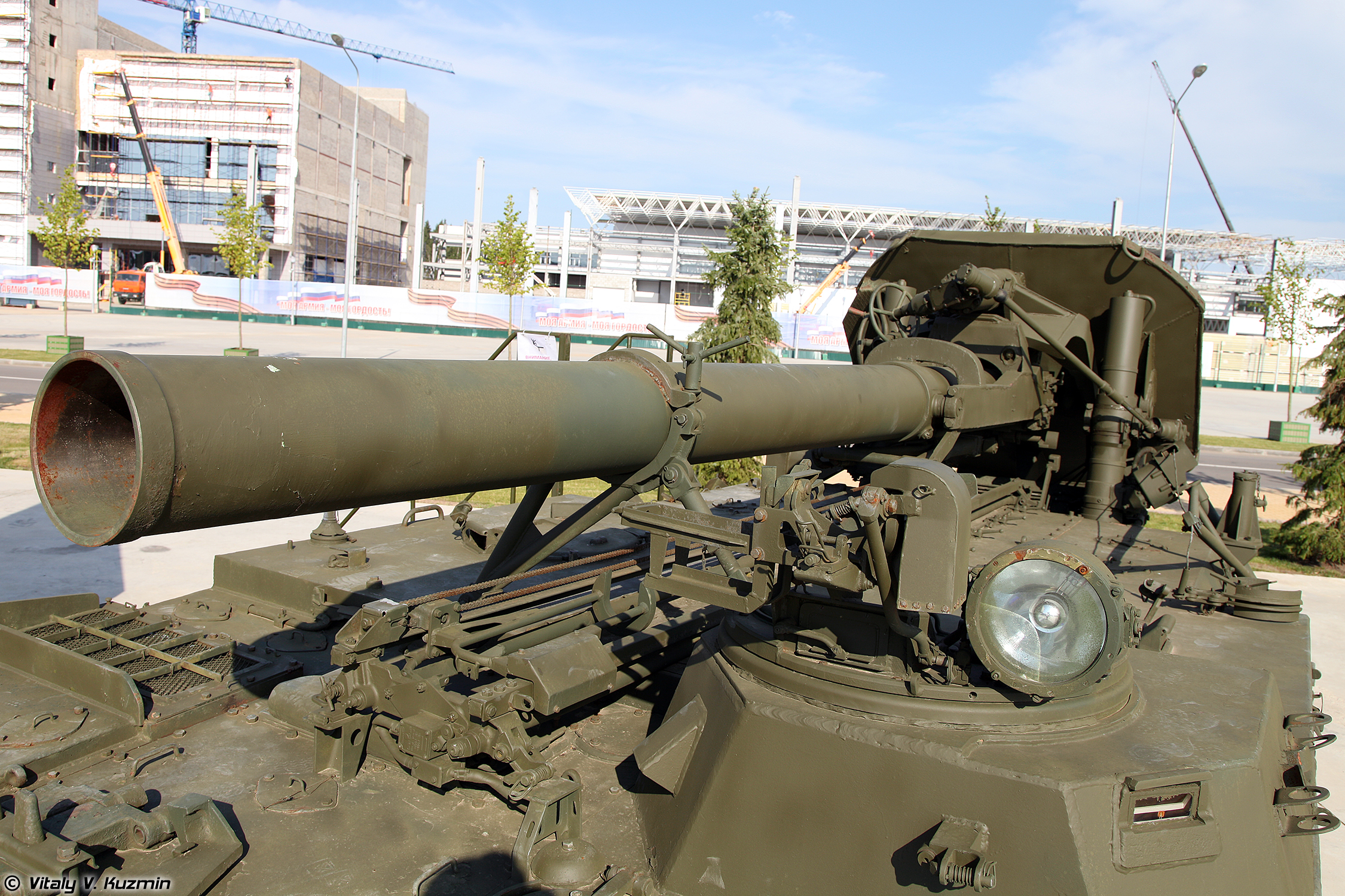 240-мм самоходный миномёт 2С4 Тюльпан (240mm self-propelled mortar 2S4 Tyulpan)